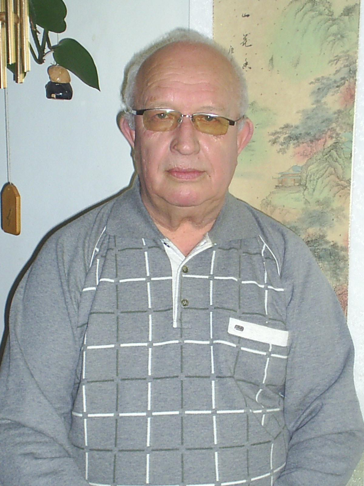 Портрет на Никола Инджов